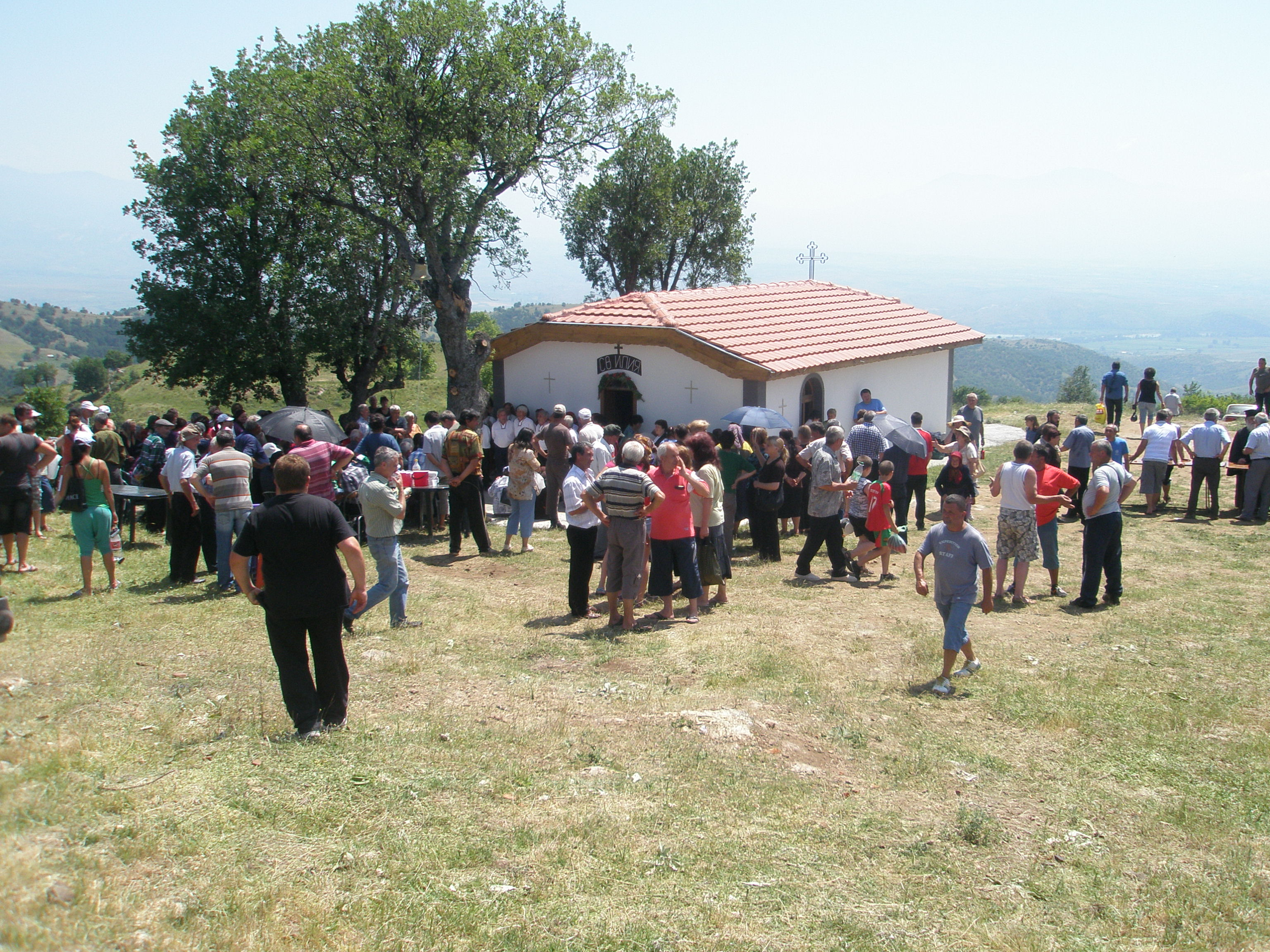 Храм св.Илия до с.Богородица